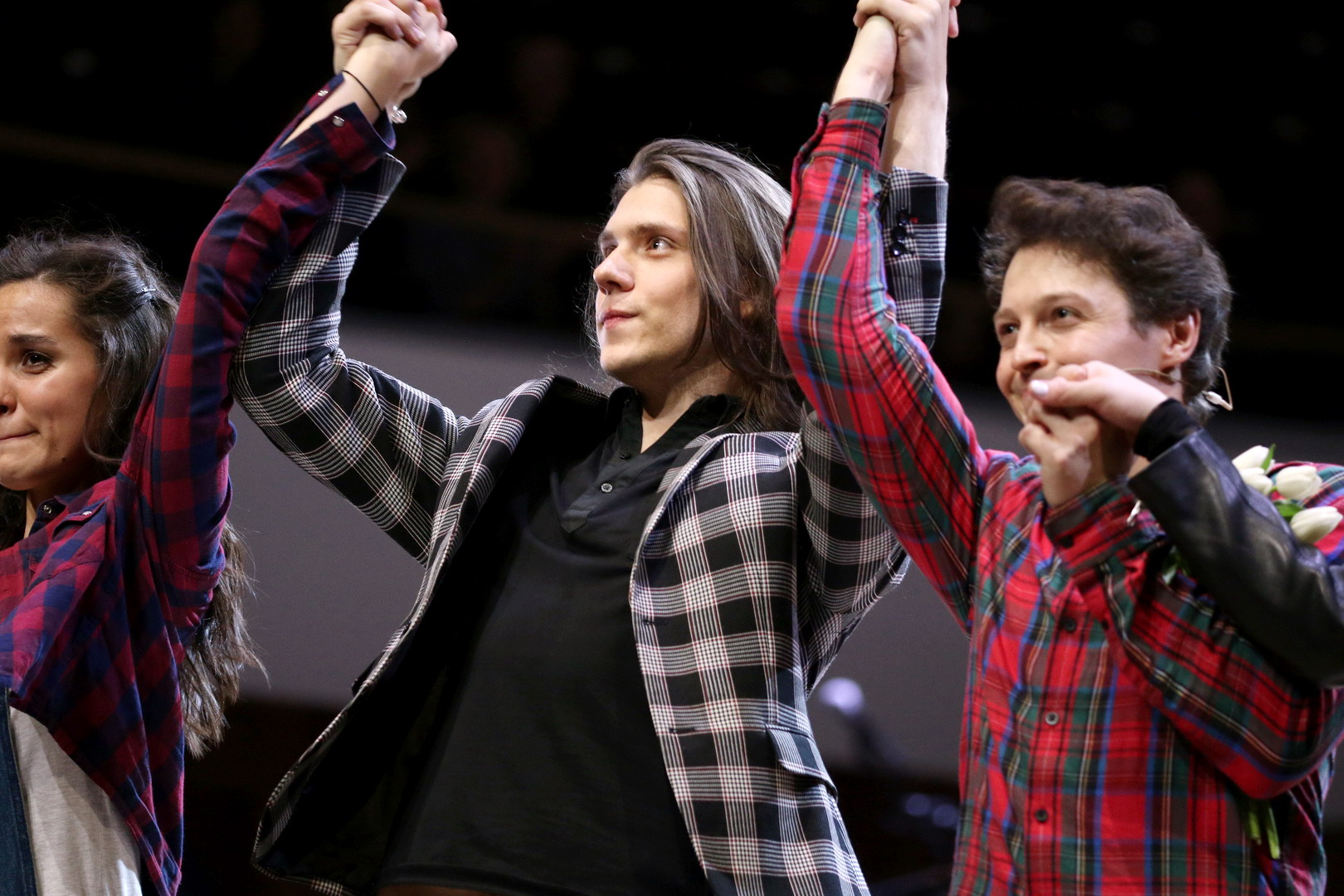 Антон Музыкантский на премьере театрализованного концерта «Игра в мюзикл» в Концертном зале «Зарядье»